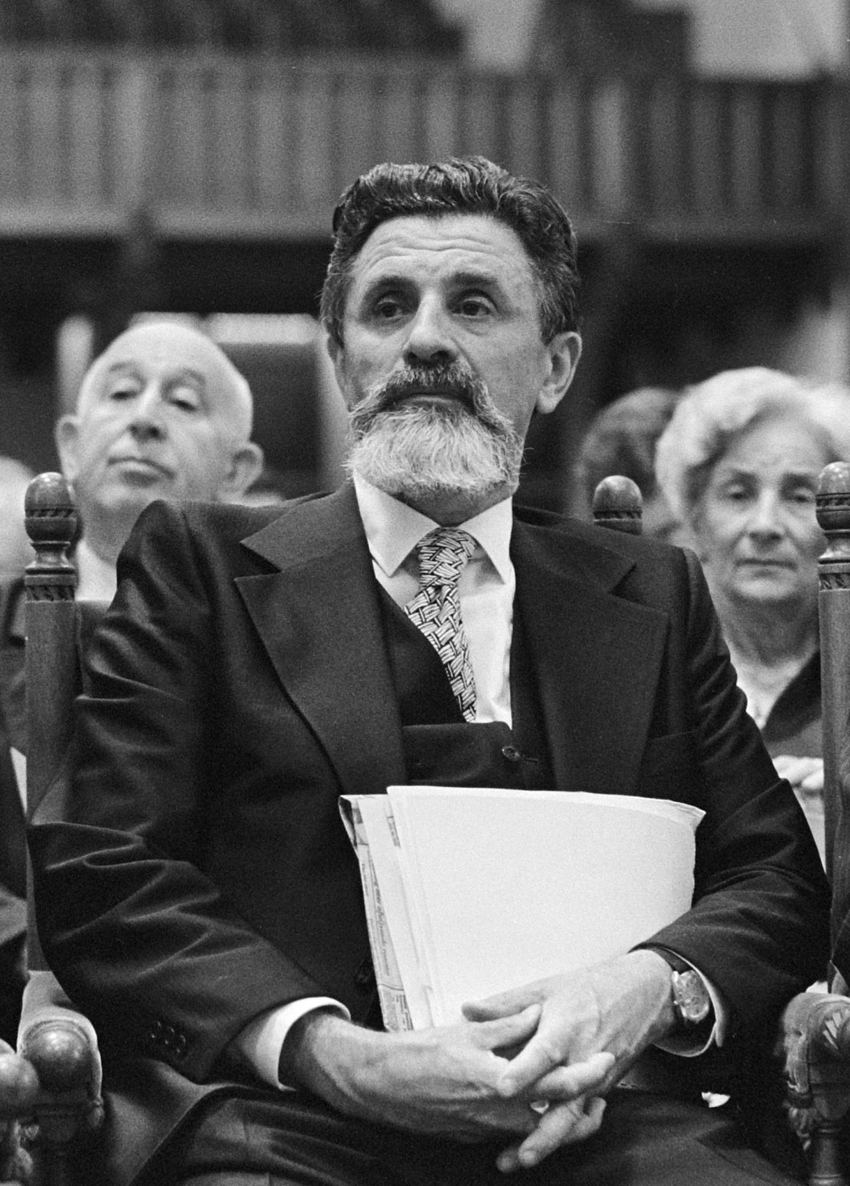 Het Sacharov-tribunaal te Den Haag , de dissident Mikhail Stern